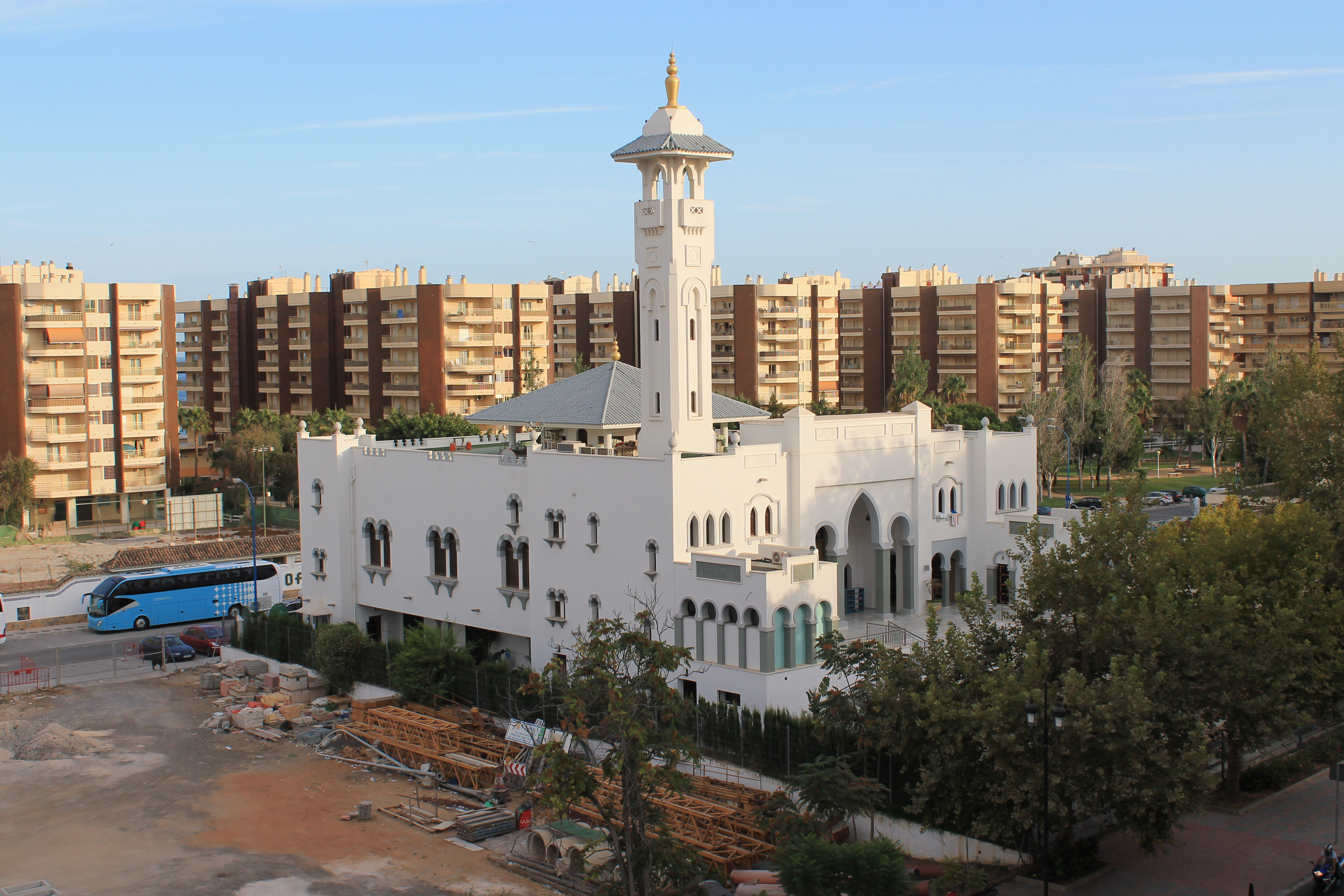 Mezquita de Fuengirola (Mezquita de Suhail) en la localidad de Fuengirola preteneciente a la provincia de Málaga en España.